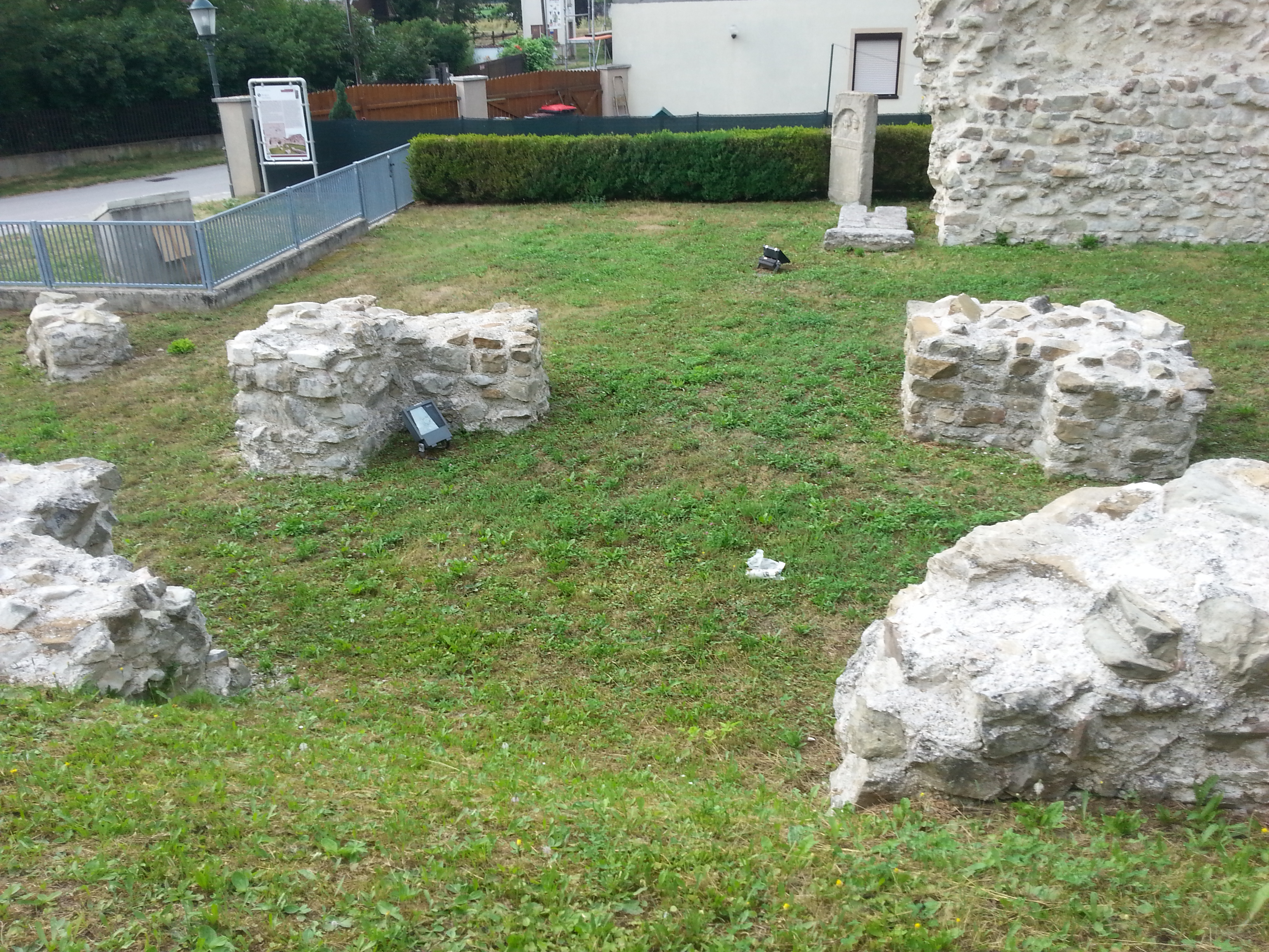 Burgus Zeiselmauer, Niederösterreich, 2018, Stützmauern des Lichthofes.